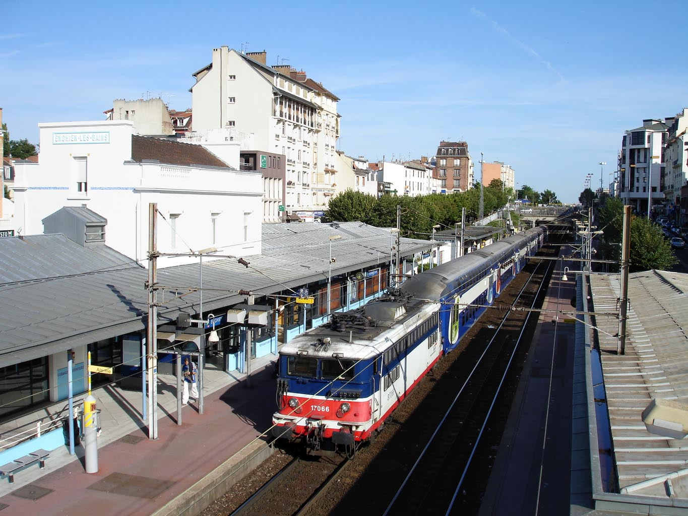 Intérieur de la gare d'Enghien-les-Bains (Val-d'Oise), France Juillet 2007 Photo personnelle (own work) de Clicsouris